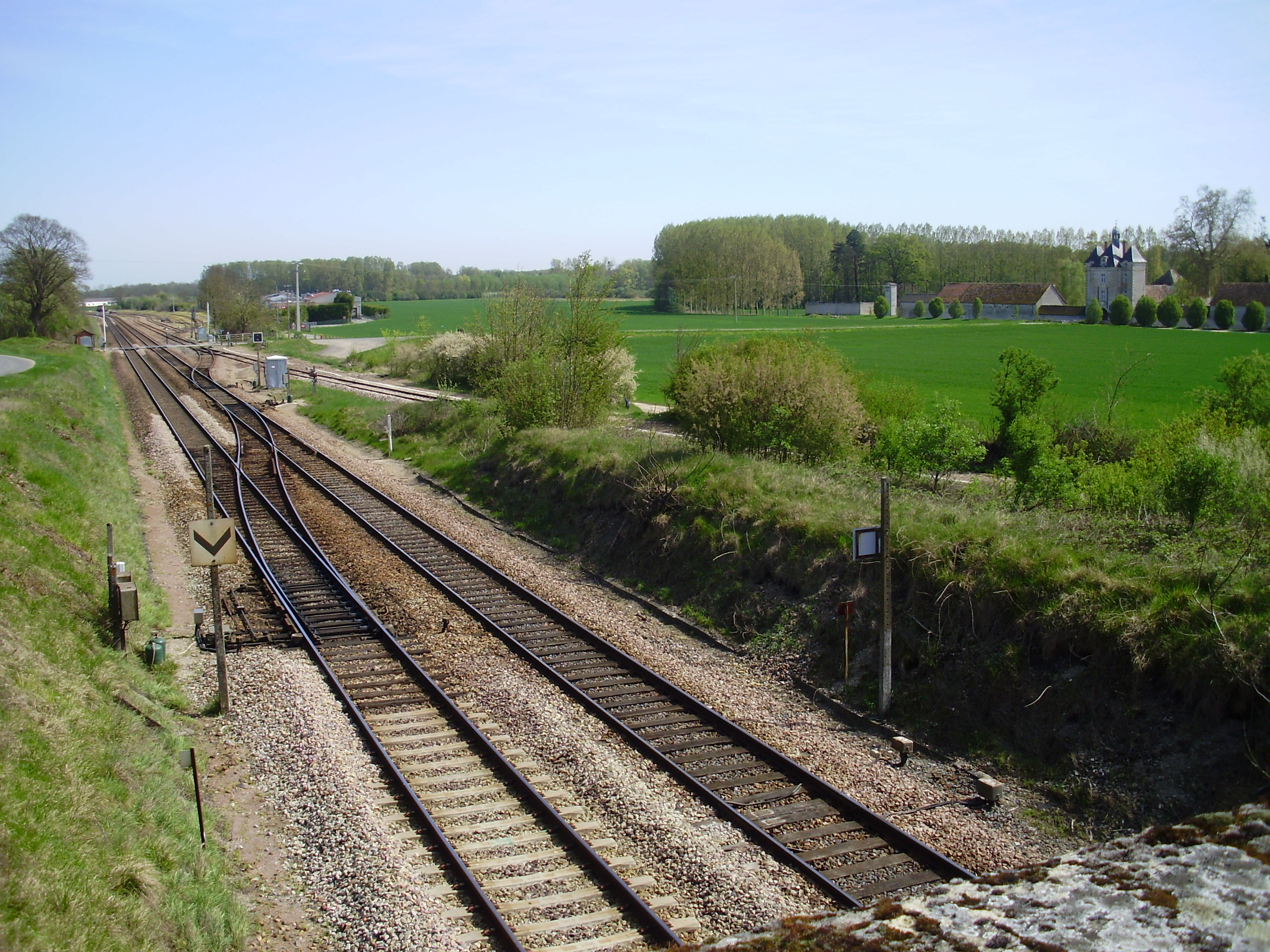 Gare de Flamboin-Gouaix, Seine-et-Marne, France (depuis un pont environ 800 m à l'ouest de la gare, vue de la bifurcation entre la ligne à double voie Paris-Est - Mulhouse-Ville, à gauche, et la ligne à voie unique Flamboin-Gouaix - Montereau, à droite)